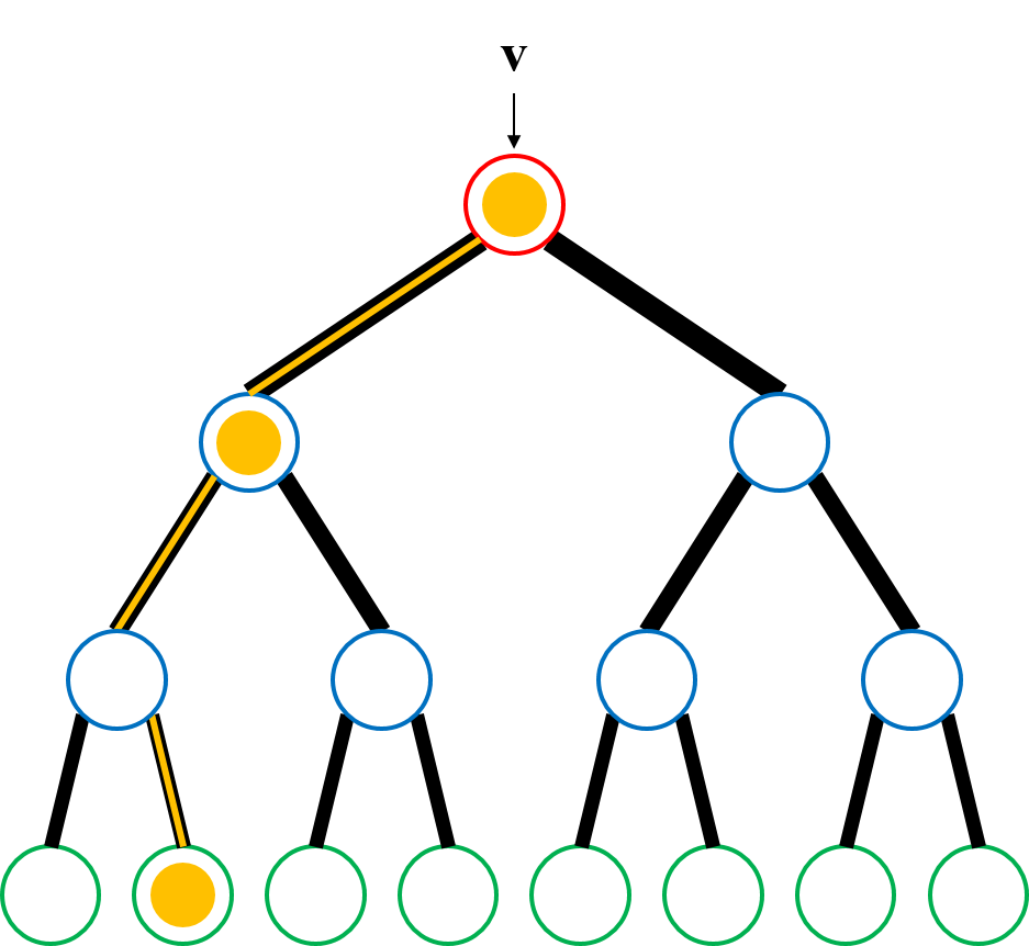 한국어 (조선): 하나의 결정 트리 내 테스트 과정 예제